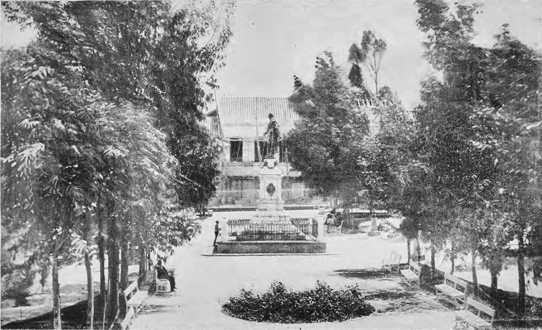 Parc Santander, Bogota